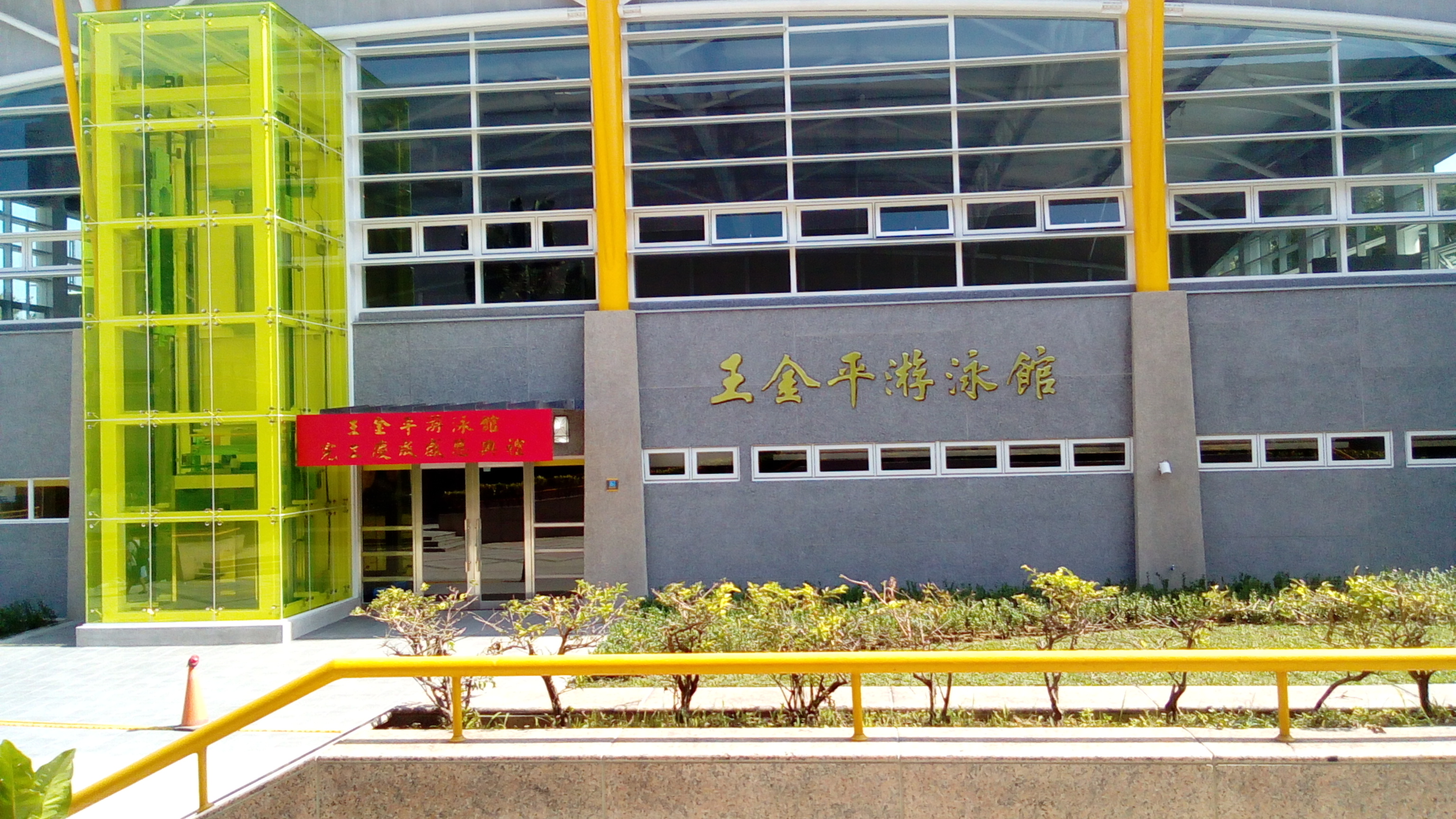 國立彰化師範大學進德校區王金平游泳館